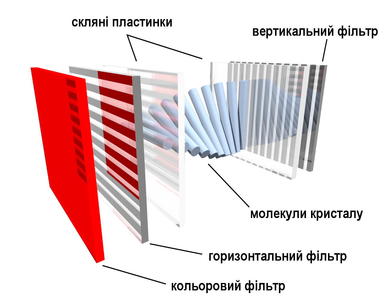 Будова пікселя рідкокристалічного дисплея